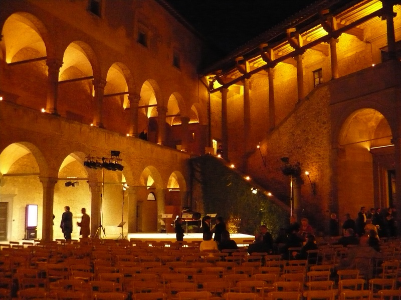 Castello Odescalchi, il cortile prima dello spettacolo